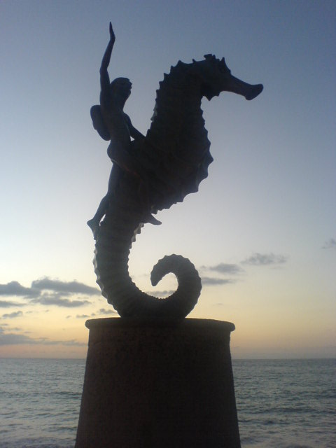 Estatua situada sobre el malecón de Pto. Vallarta, Jalisco. Caballo de mar y jinete.